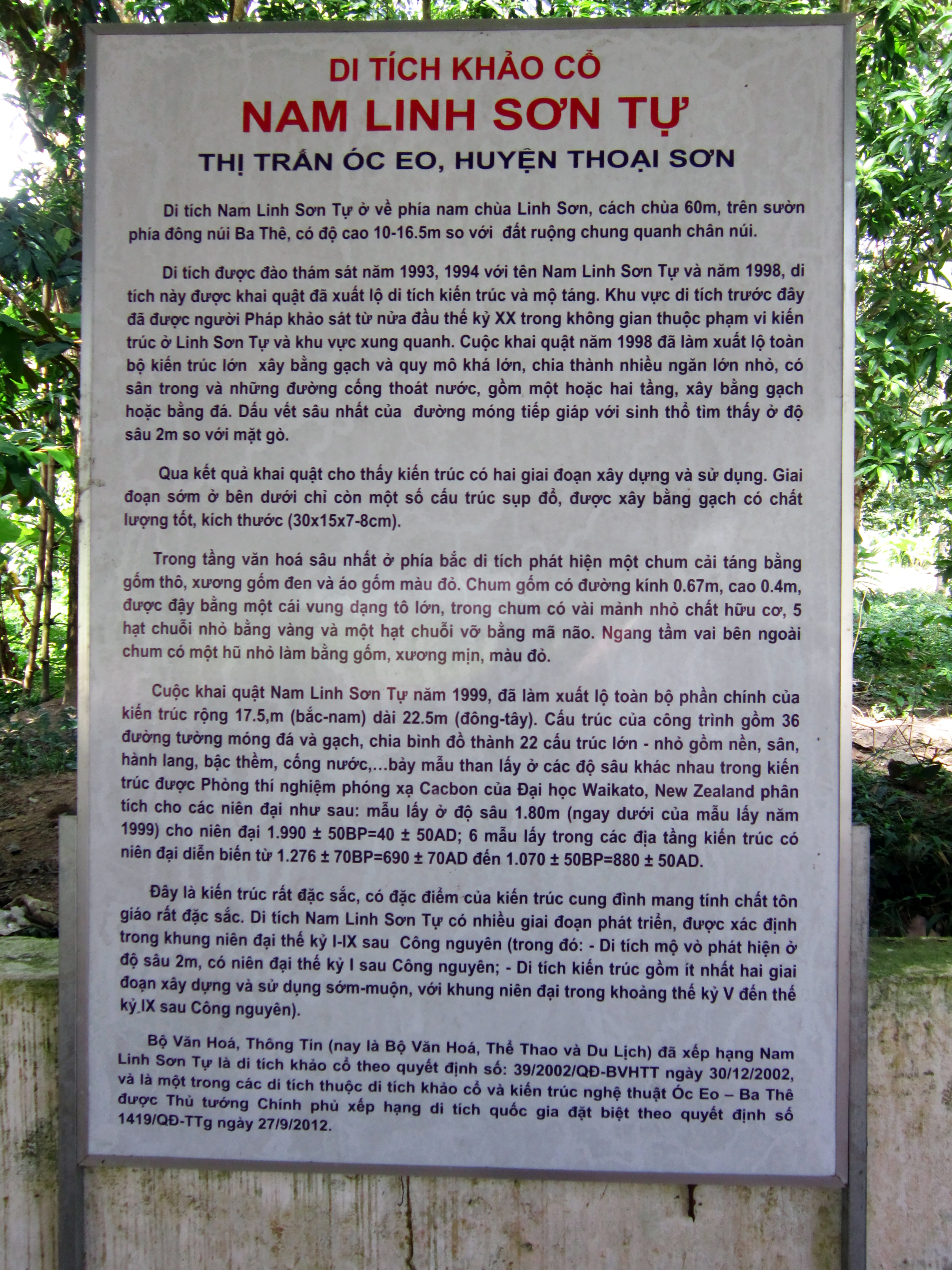 Bảng giới thiệu di tích khảo cổ Nam Linh Sơn Tự (một trong những di tích thuộc nền văn hóa Óc Eo) ở núi Ba Thê, thuộc thị trấn Óc Eo, huyện Thoại Sơn, An Giang, Việt Nam.